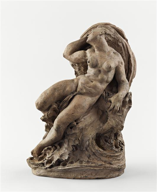 Augustin Préault, La Vague, 1856, terre cuite, Dijon, musée Magnin.